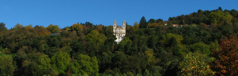 Panorama do Bom Jesus do Monte, Braga.